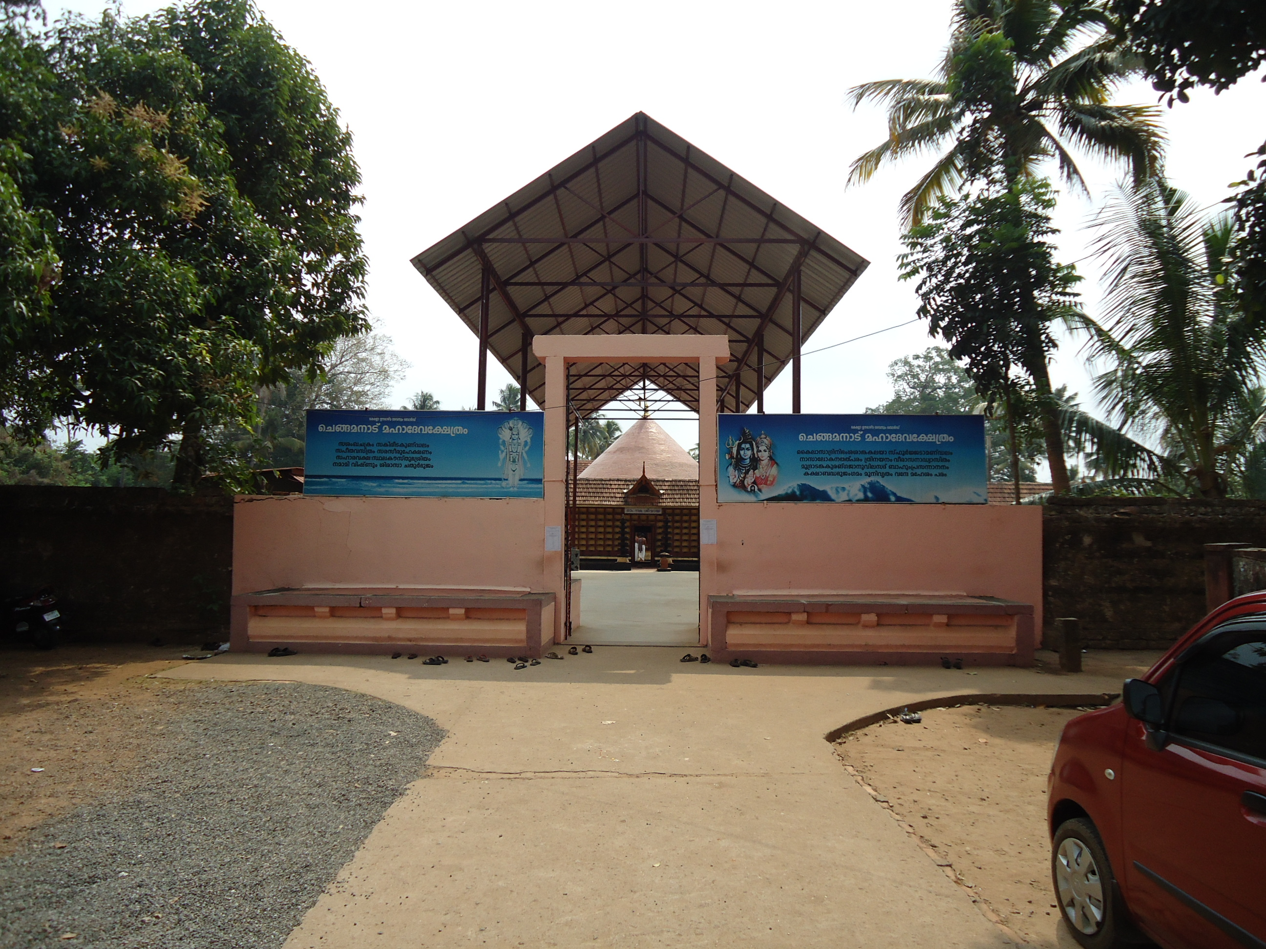 Sree Mahadeva Temple Chengamanadu Board.